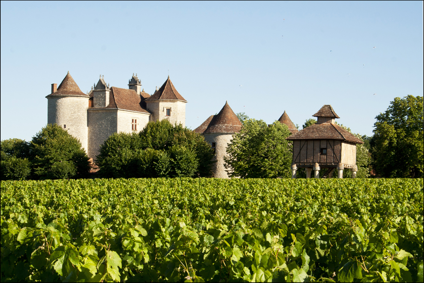 Château de La Grézette ou Château Lagrézette, et son pigeonnier, situés à Caillac dans le Lot (France) .